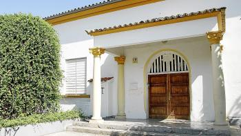 Escoleta de Pont d'Inca